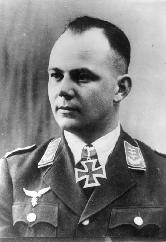 Der Führer überreichte Major Koch (hier mit Rangabzeichen Hauptmann) persönlich das Ritterkreuz des E. K. Zusammen mit den Eroberern des Forts Eben Emael und der Brücke über den Albert-Kanal erhielt der Hauptmann der Luftwaffe Koch unter gleichzeitiger Beförderung zum Major aus der Hand des Ritterkreuz des Eisernen Kreuzes als Lohn für seine unvergleichlich kühne Tat. Scherl Bilderdienst 13.5.1940